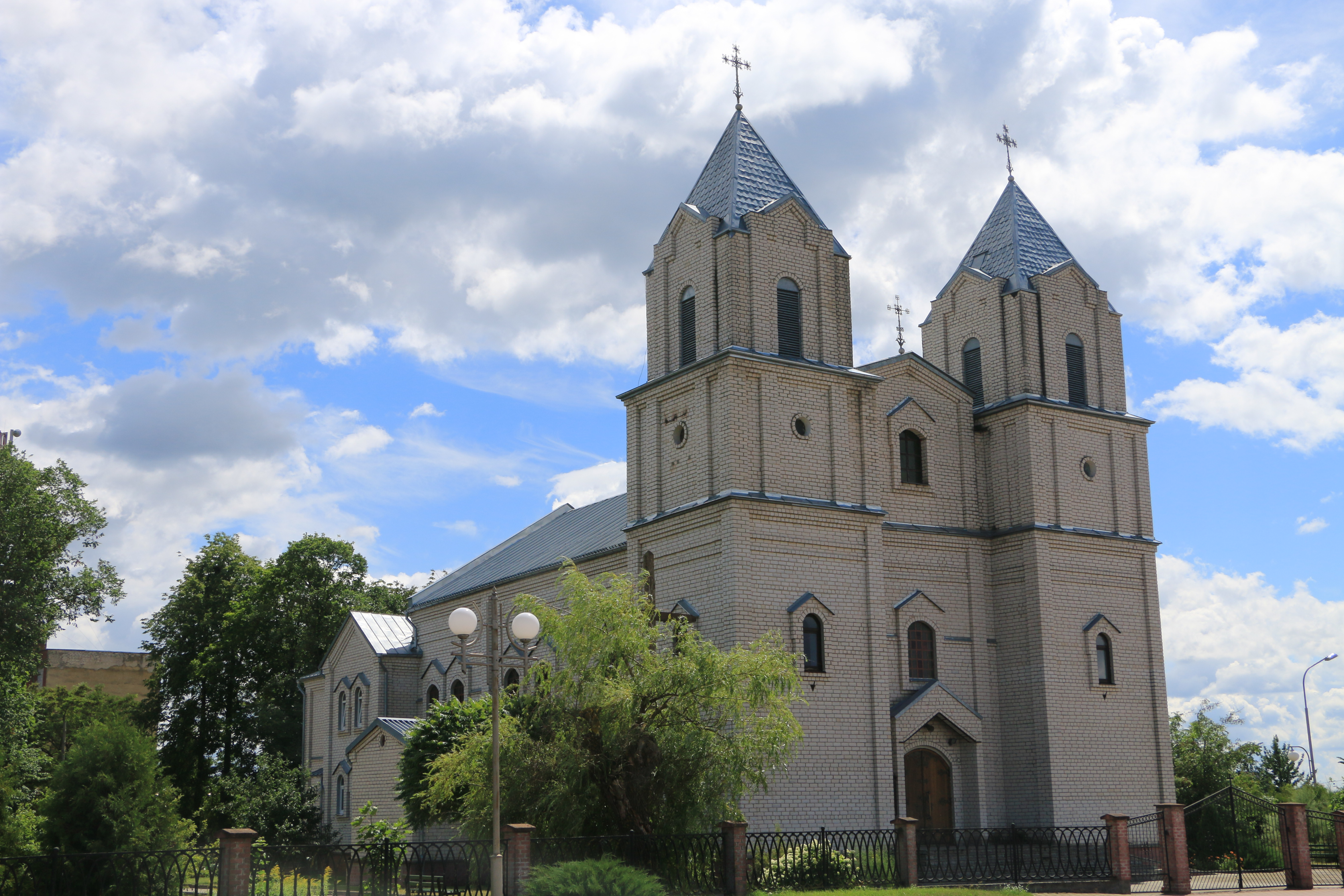 Aziory, Belarus